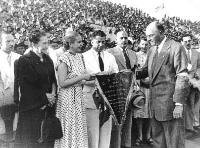 Entrega de un banderín con los colores de Colón por parte del presidente de la institución en aquel entonces, Fernando De Feo a la señora Eva Perón.